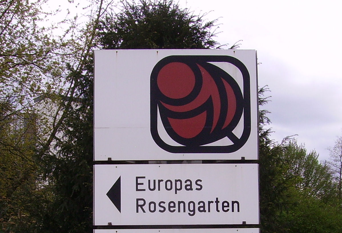 view of Zweibrücken, Germany